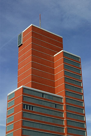 Swisscom-Building in Winterthur (Nr. 03.1-5427)